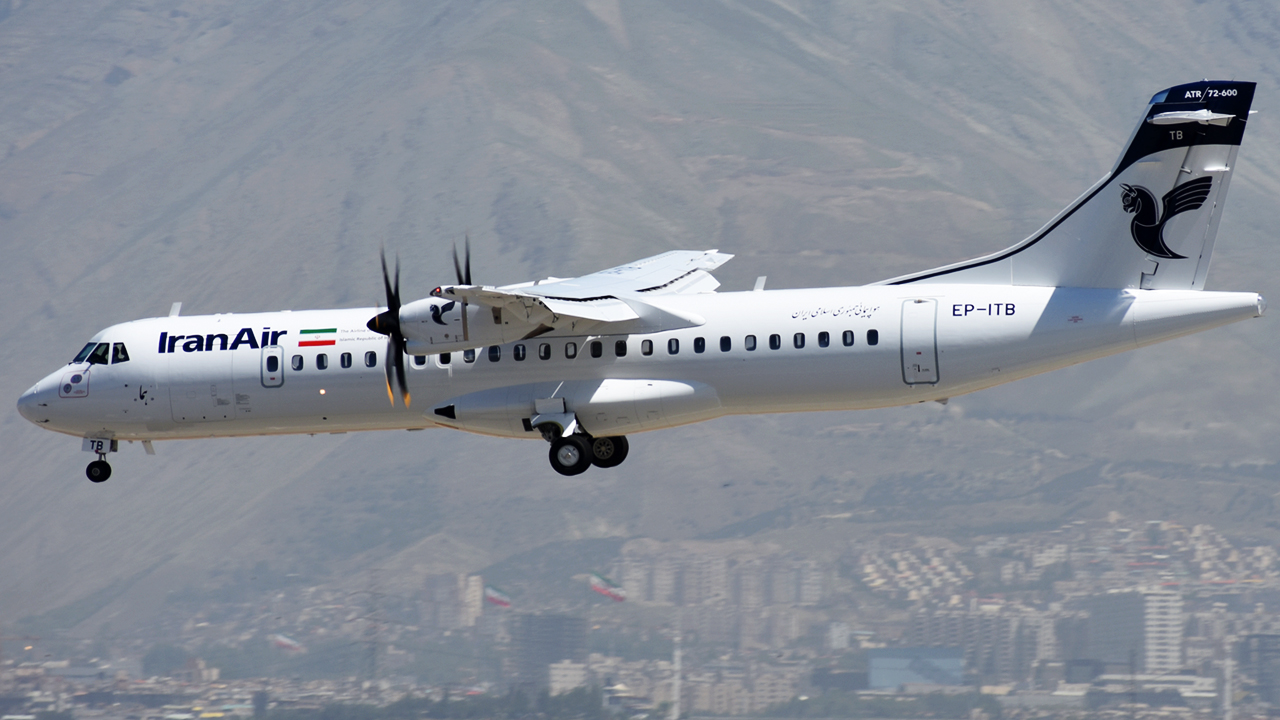 لحظه ورود دومین ای تی ار پسابرجامی به تهران